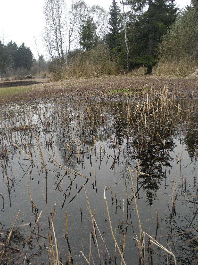 PR Chvojnov